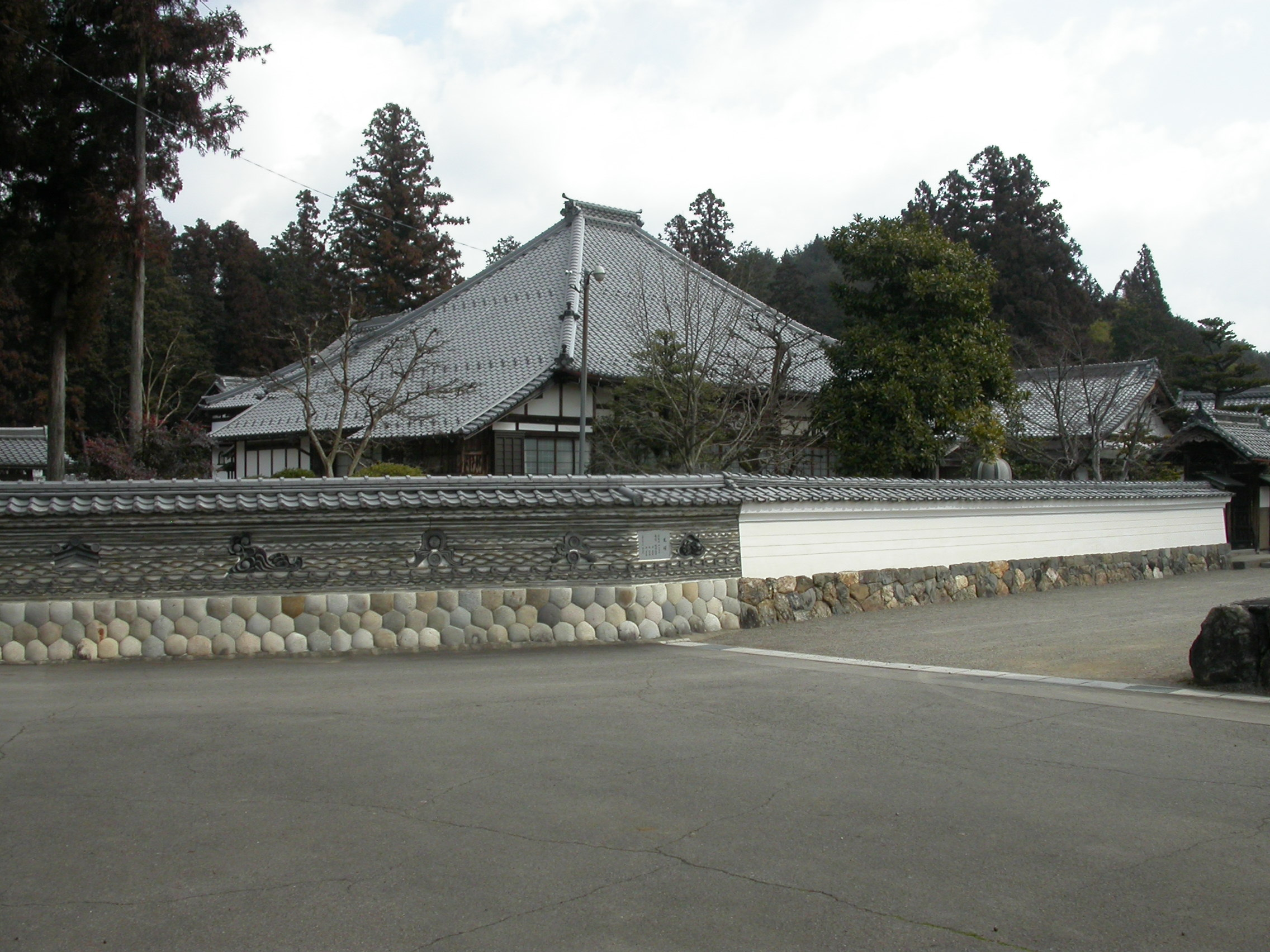 道樹寺の西入口